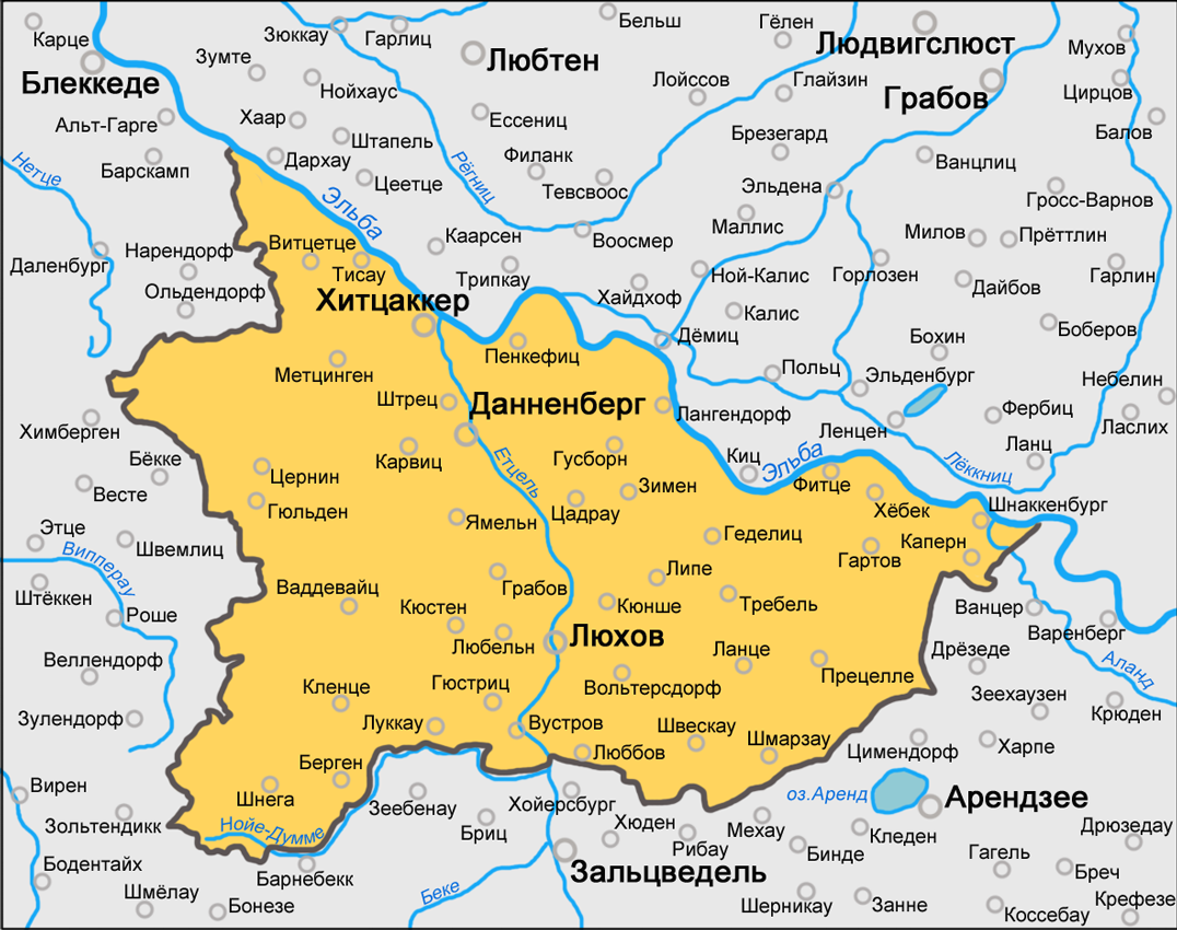 Люхов-Данненберг — район земли Нижняя Саксония (Германия). Источники: Lüchow-Dannenberg District Map Landkreis Lüchow-Dannenberg